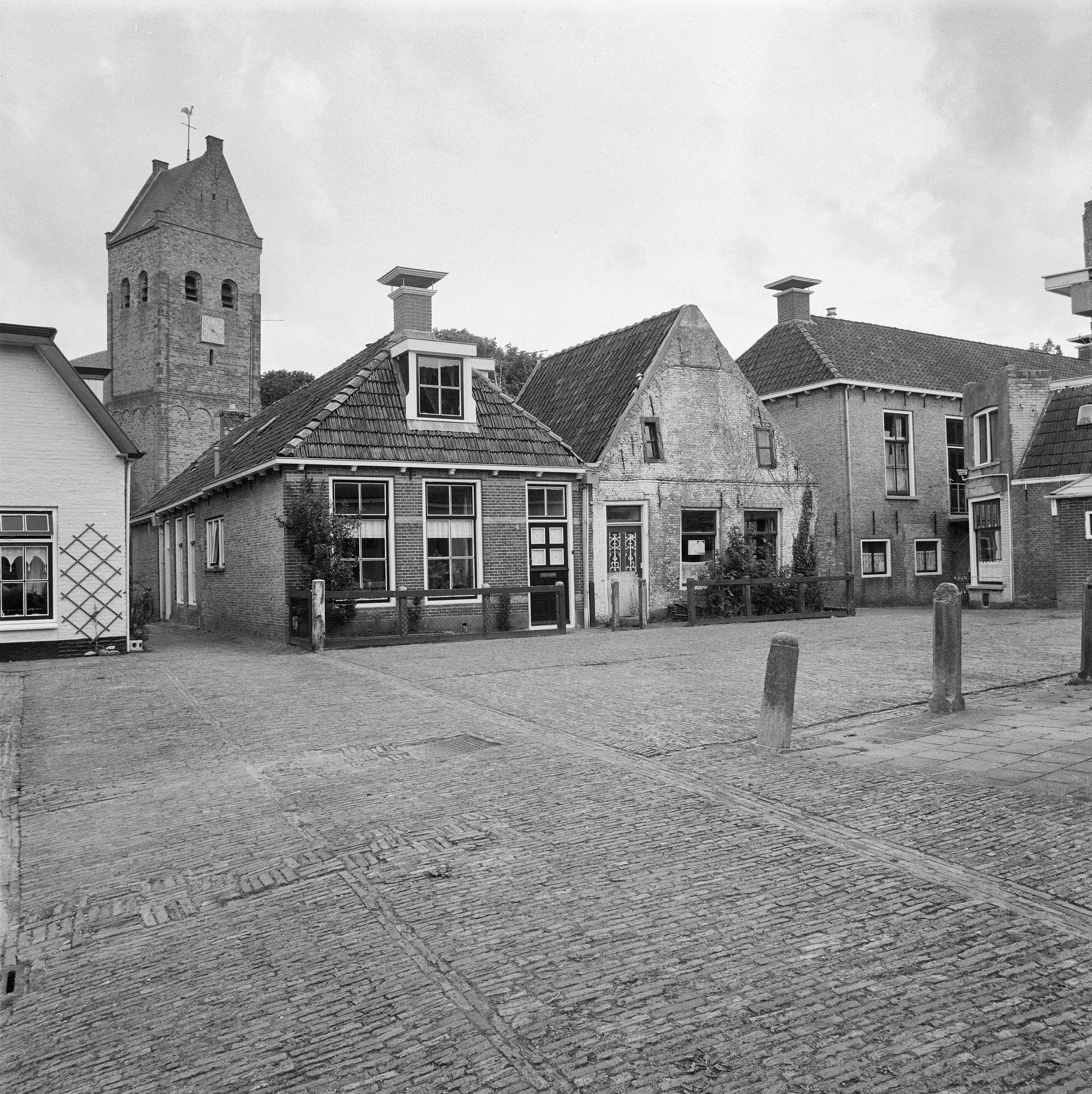 Exterieur OVERZICHT VOORGEVEL